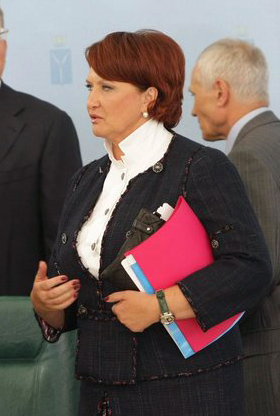 Елена Скрынник перед началом заседания президиума Государственного совета «О регулировании внутреннего продовольственного рынка»